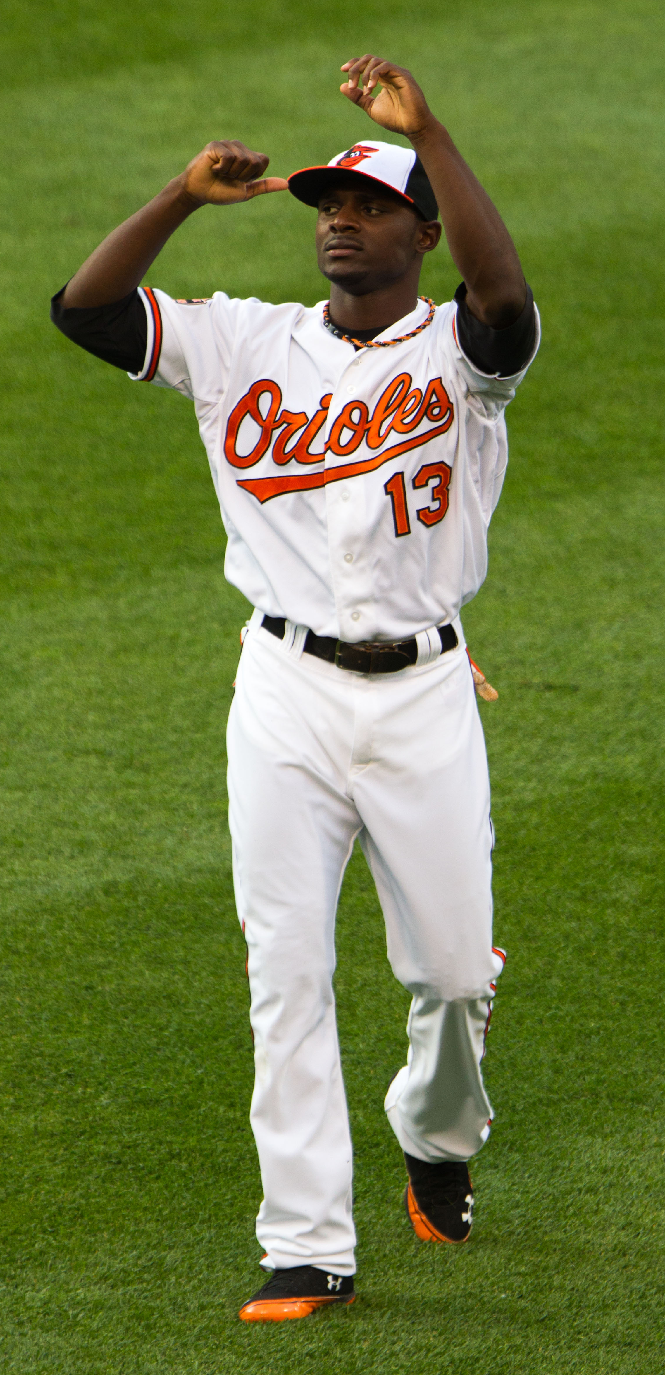 Xavier Avery